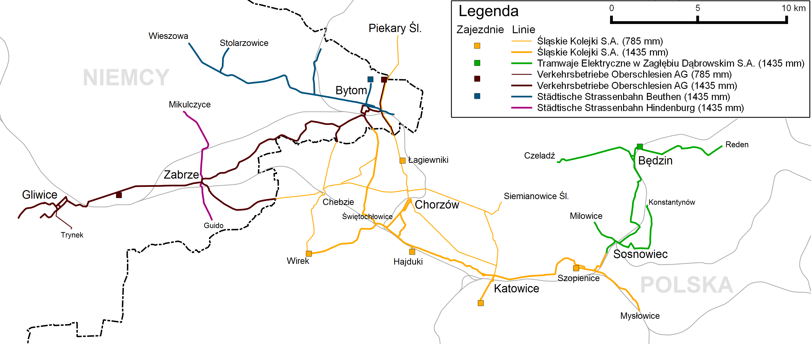 Sieć tramwajowa konurbacji górnośląskiej w połowie 1939 z podziałem na szerokość torów i ich właścicieli